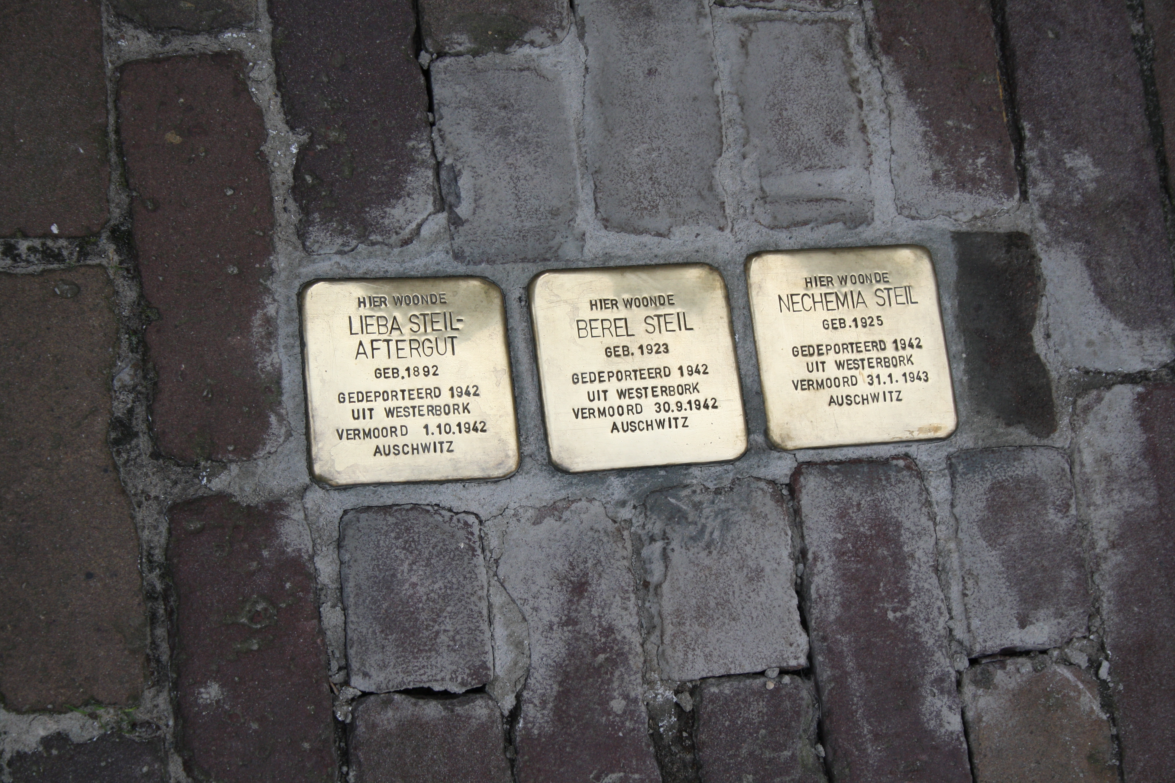 Stolpersteinen in Harlingen